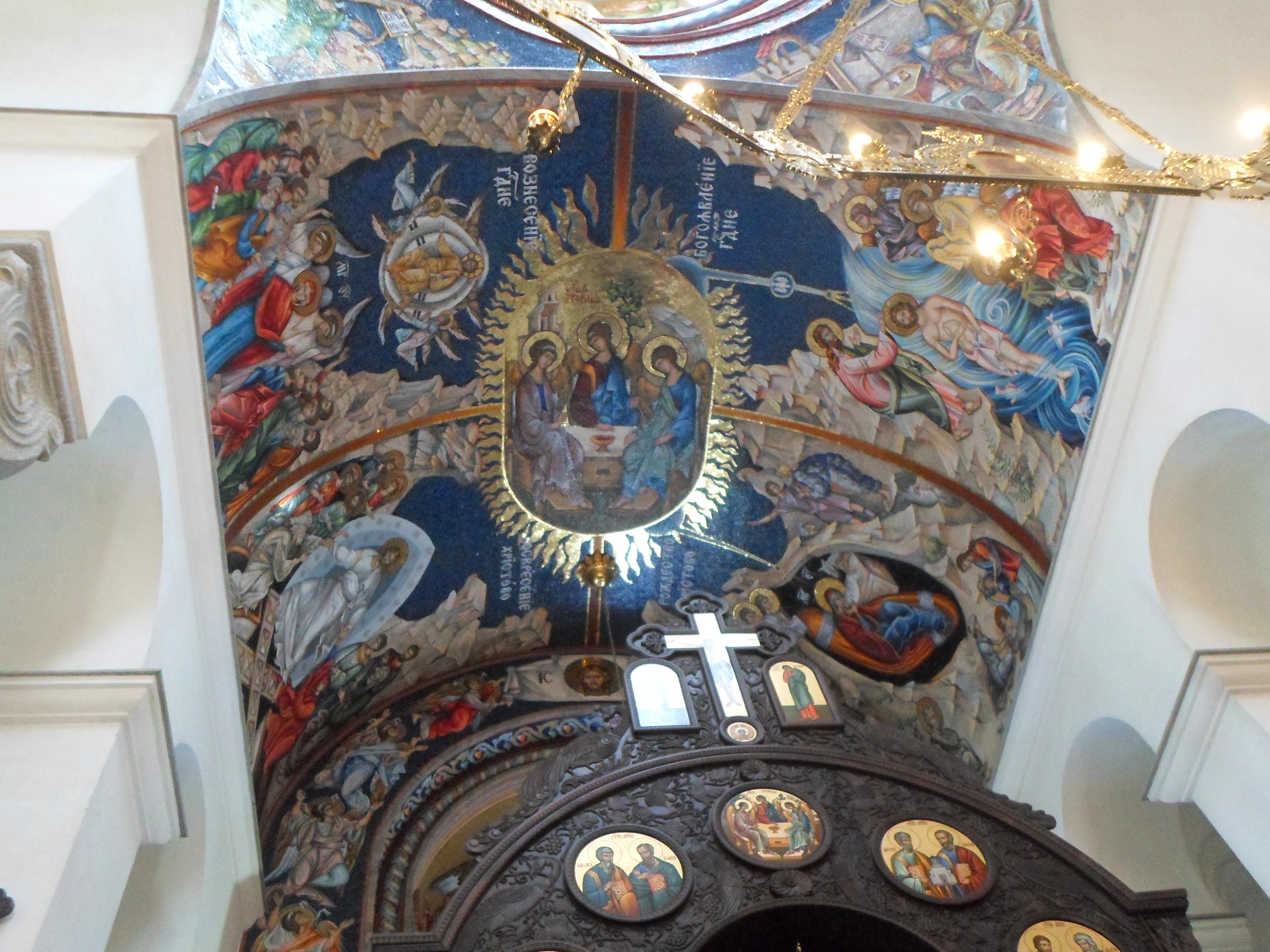 Saborni hram Hrista Spasitelja u Banjoj Luci This image was uploaded as part of Trace of Soul 2016.